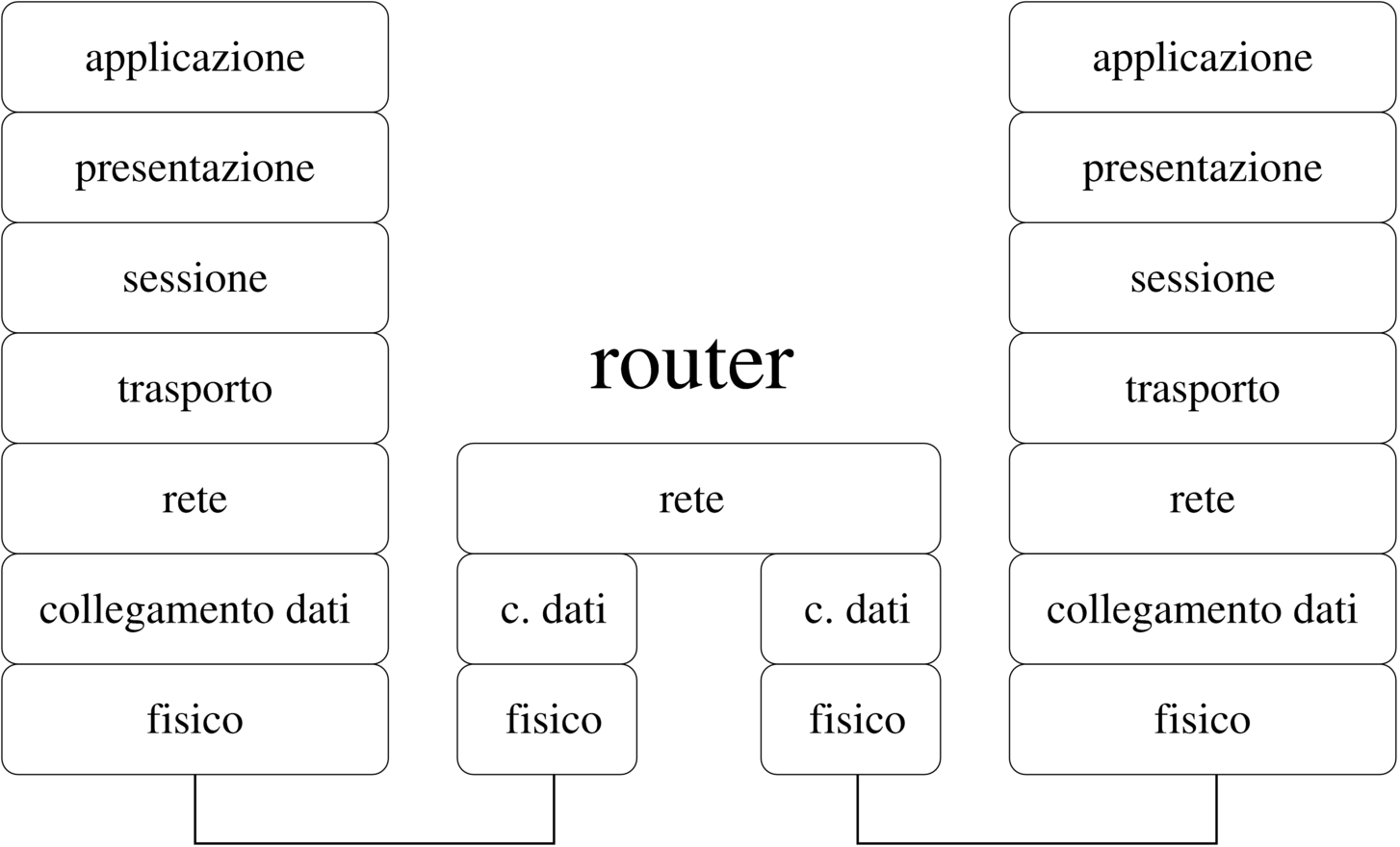 Figura 32.11. Il router trasferisce PDU di terzo livello; in pratica trasferisce i pacchetti di un certo tipo di protocollo a livello di rete.